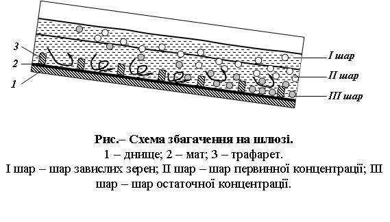 Схема збагачення на шлюзі